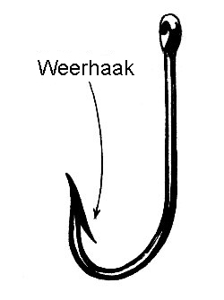 Weerhaak aan een vishaakje